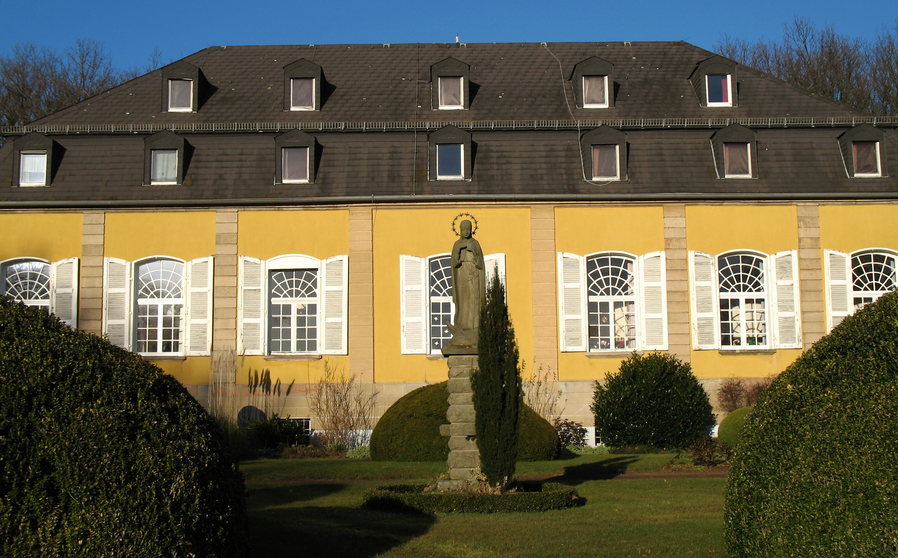 Bildungsstätte Haus Maria Rast (Schönstattzentrum), Hauptgebäude, bei Kreuzweingarten (Euskirchen)